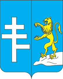 Буданів-герб: Герб австрійського періоду